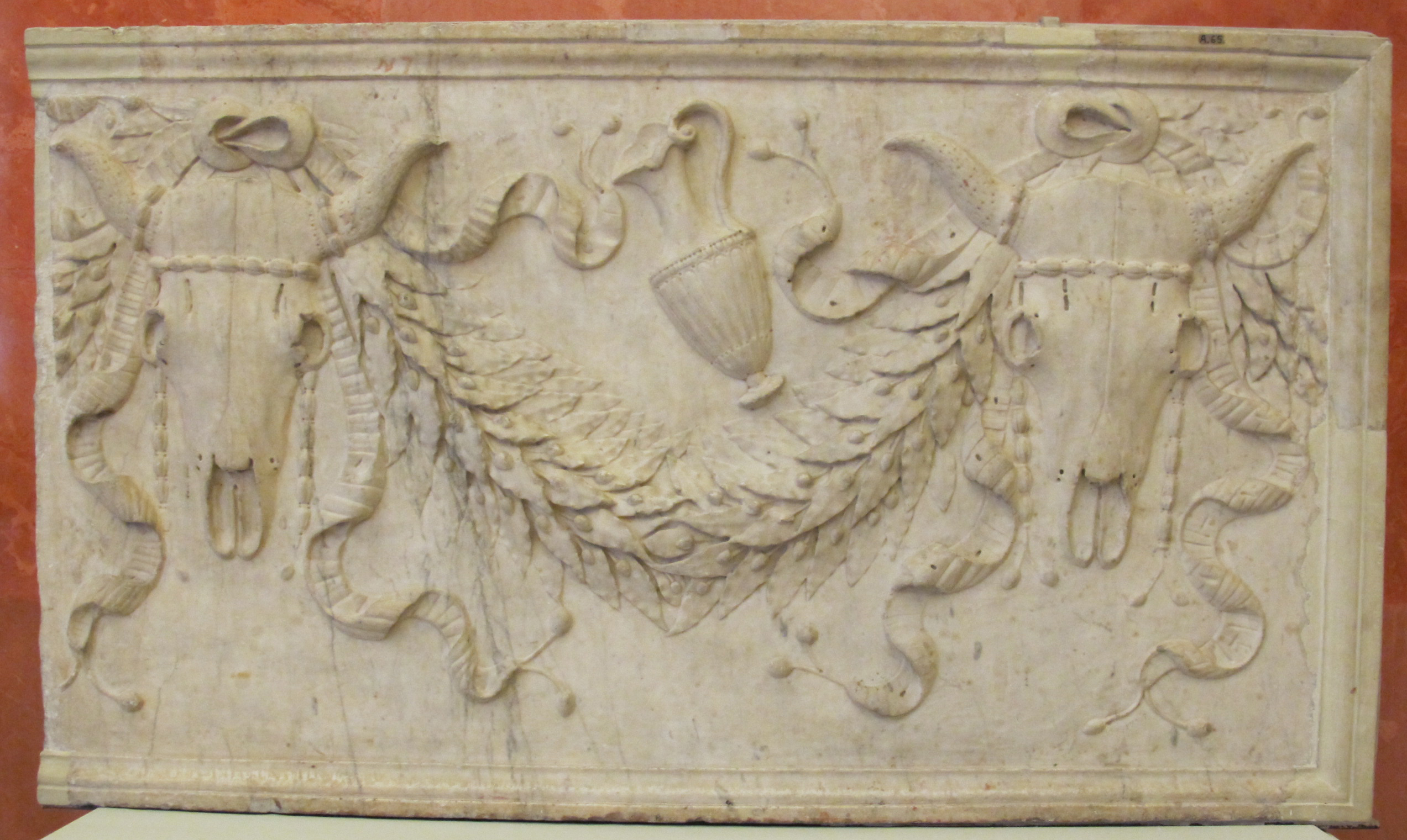 Pannello decorativo con bucrani e festone, inizio I sec. dc